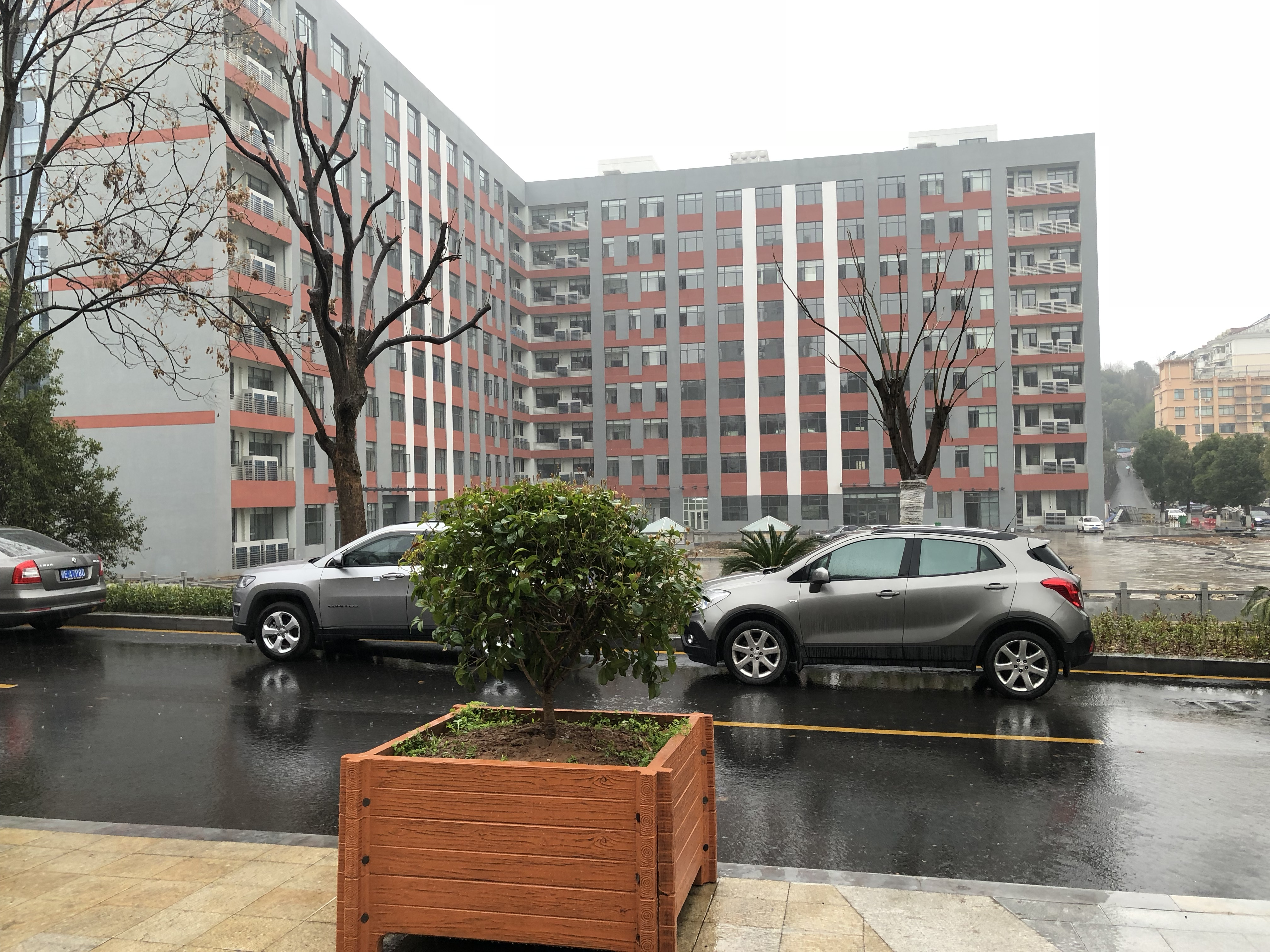 中文（中国大陆）: 湖北三峡职业技术学院校园